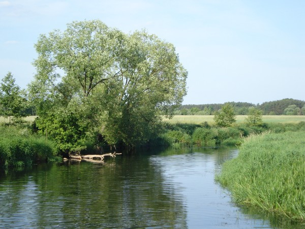 zdjecie